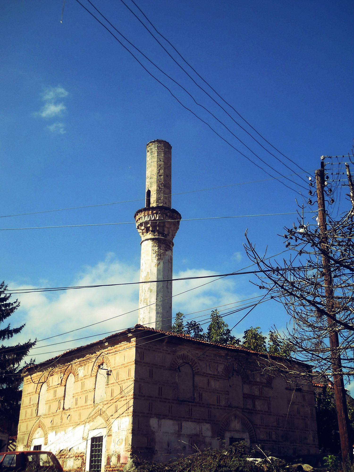 Џамија”Коџа Кади”, ул.”Кузман Јосифоски” бр.30 Битола